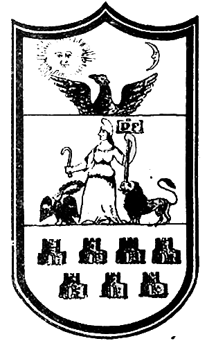 Romanian proposal for Transilvanian CoA, in 1848